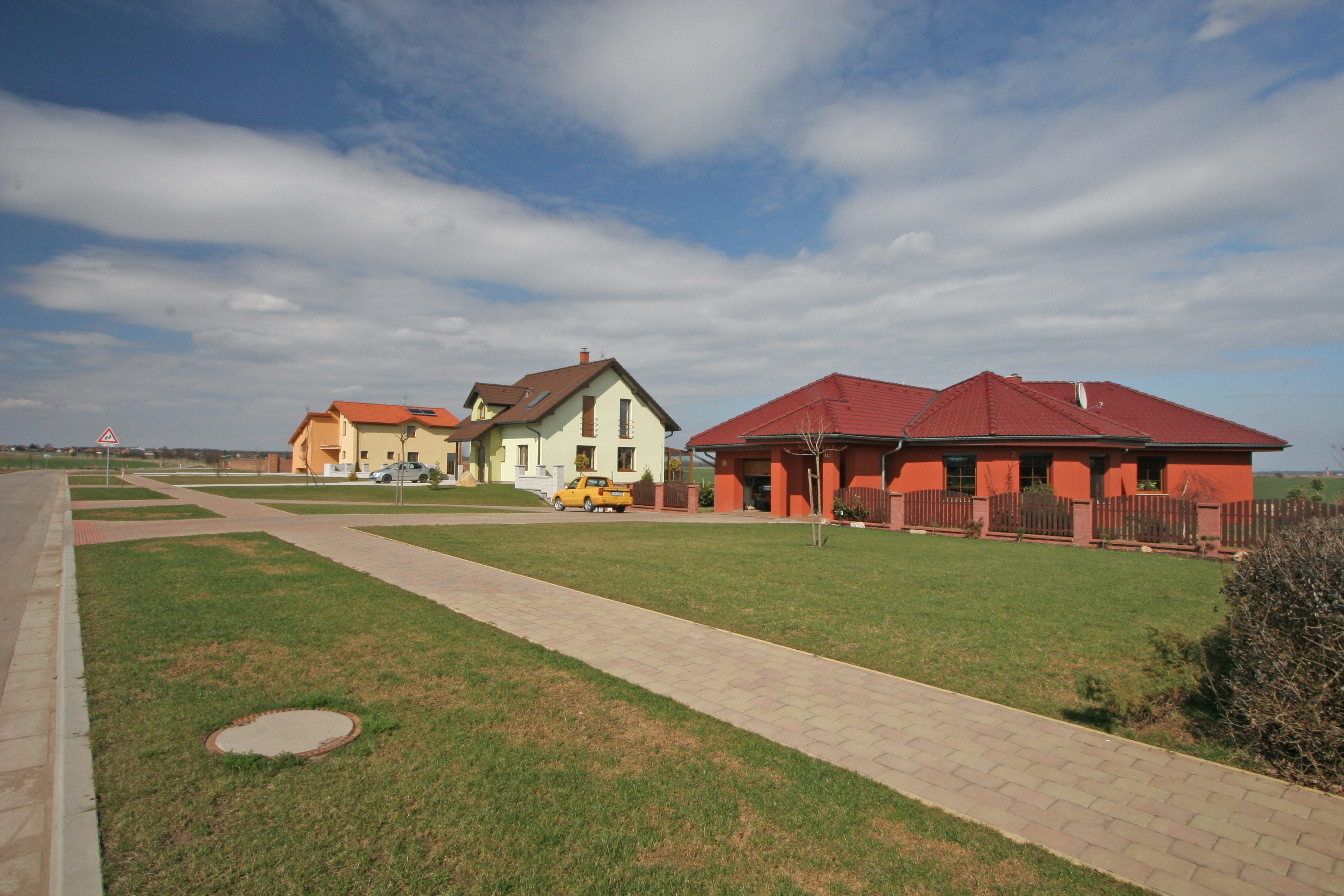 Kosice čp. 140